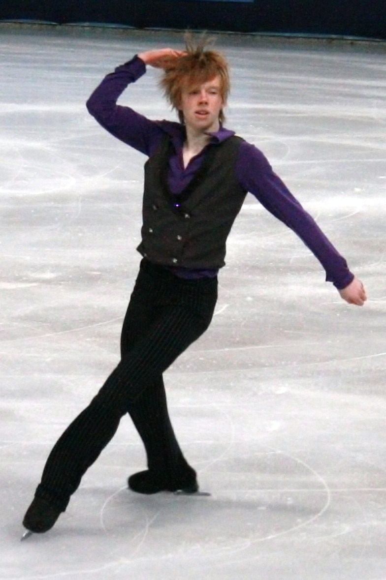 Kевин Рейнольдс на 2011 Trophée Eric Bompard